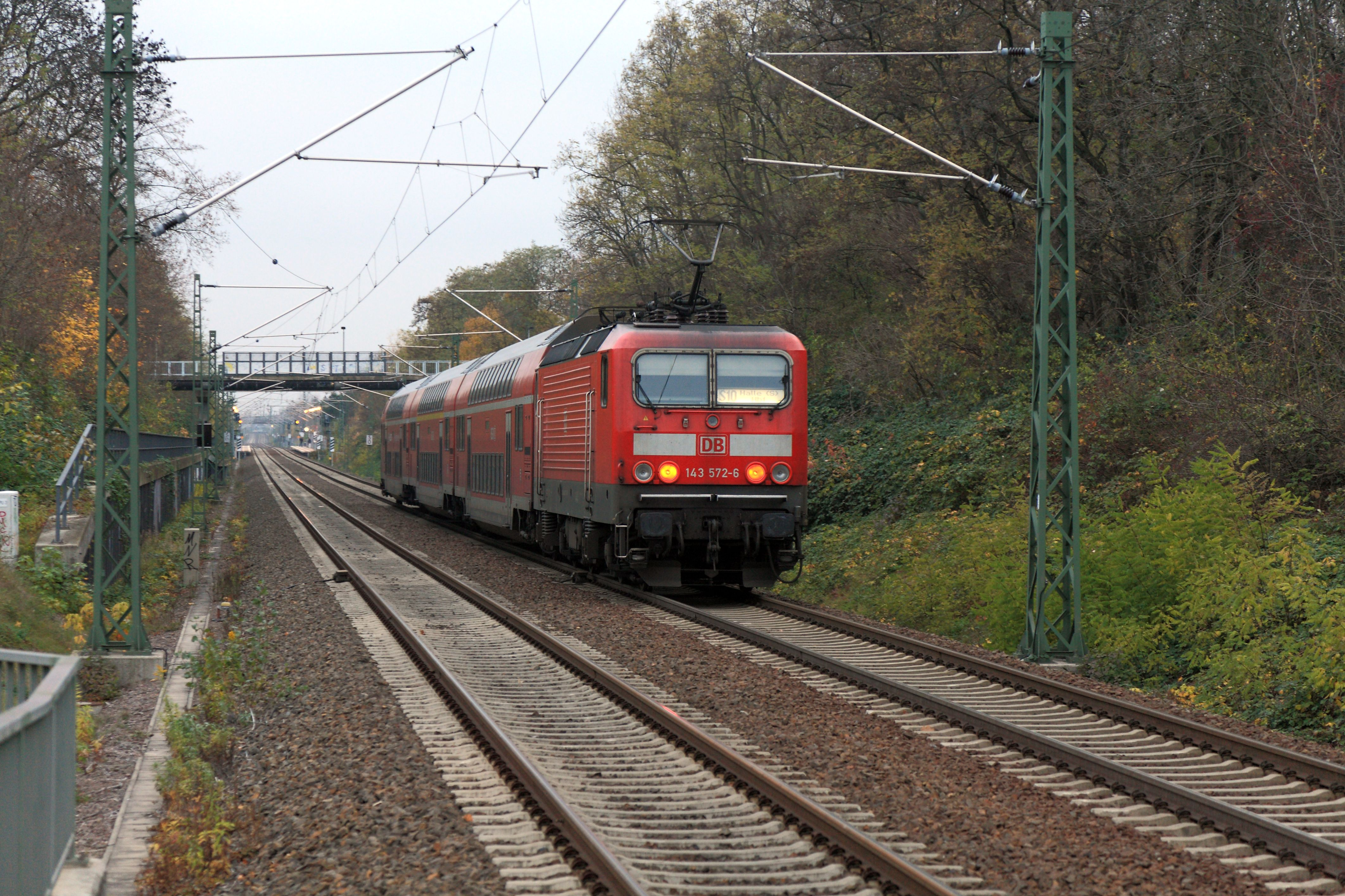 S-Bahn-Wendezug der Linie S10, Nachschuss Richtung Slevogtstraße, vier Wochen vor der Betriebsumstellung.